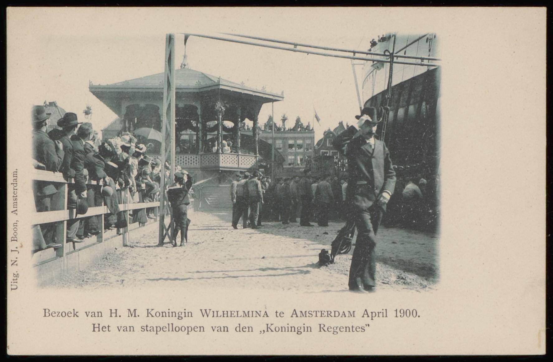 Beschrijving Marine-etablissement, Grote Kattenburgerstraat 7-17C tijdens bezoek van Koningin Wilhelmina en prins HendrikUitgave N.J. Boon, AmsterdamDocumenttype prentbriefkaartVervaardiger Boon, N.J. (uitgever)Collectie Collectie Stadsarchief Amsterdam: prentbriefkaartenDatering april 1900 ca.Geografische naam Grote KattenburgerstraatInventarissen PBKD00143000005 Generated with Dememorixer